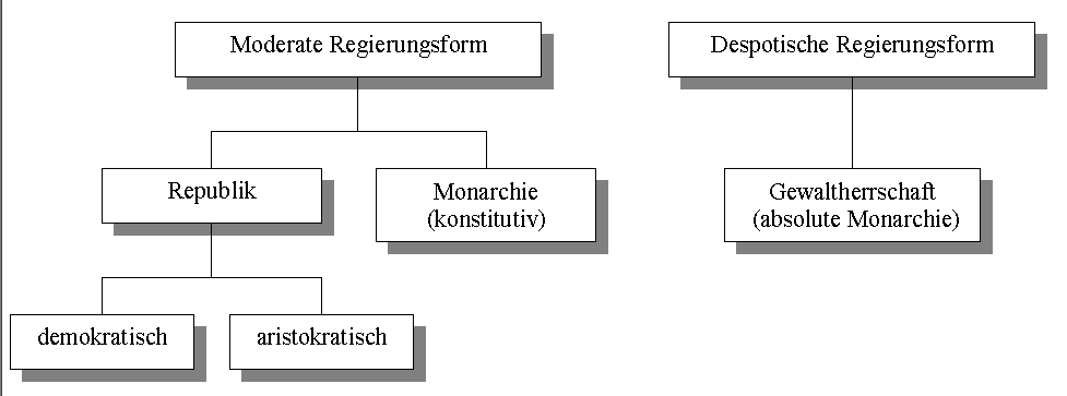 Schema der Staatsformen nach der Vorstellung Montesquieus (1748)